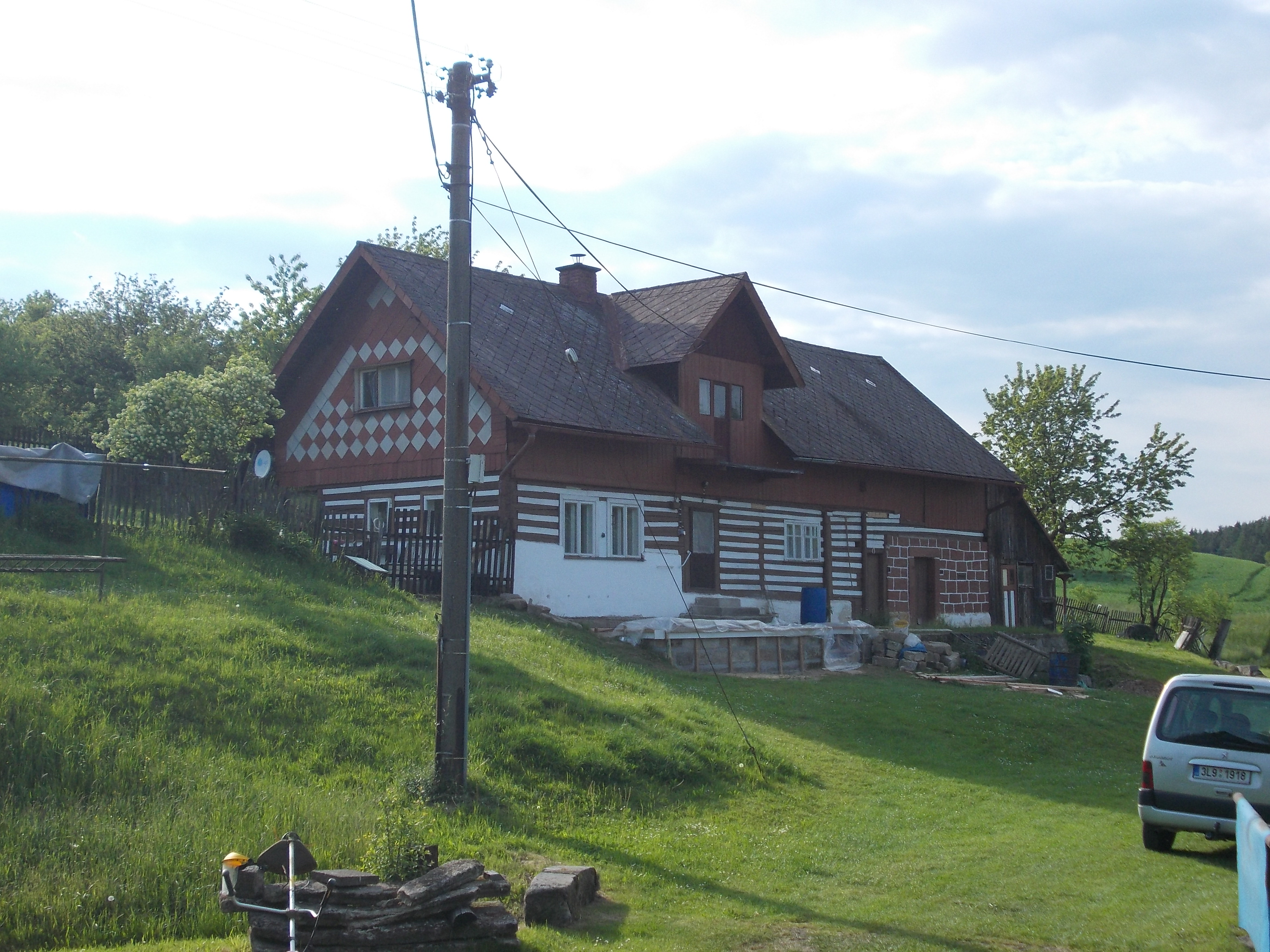 Pařízek - č.p. 6